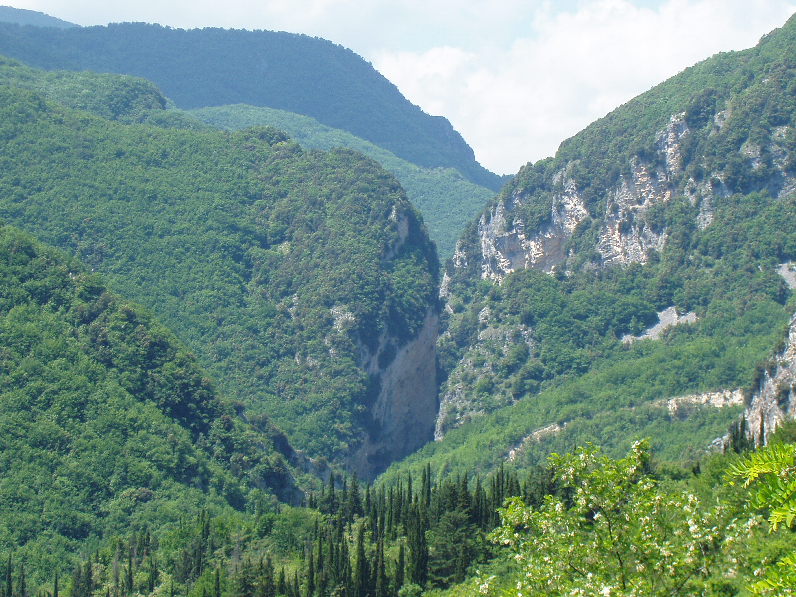 Lucio De Marcellis, Gole del Salinello tra i Monti Gemelli, GFDL e Creative Common CC-BY-SA tutte le versioni